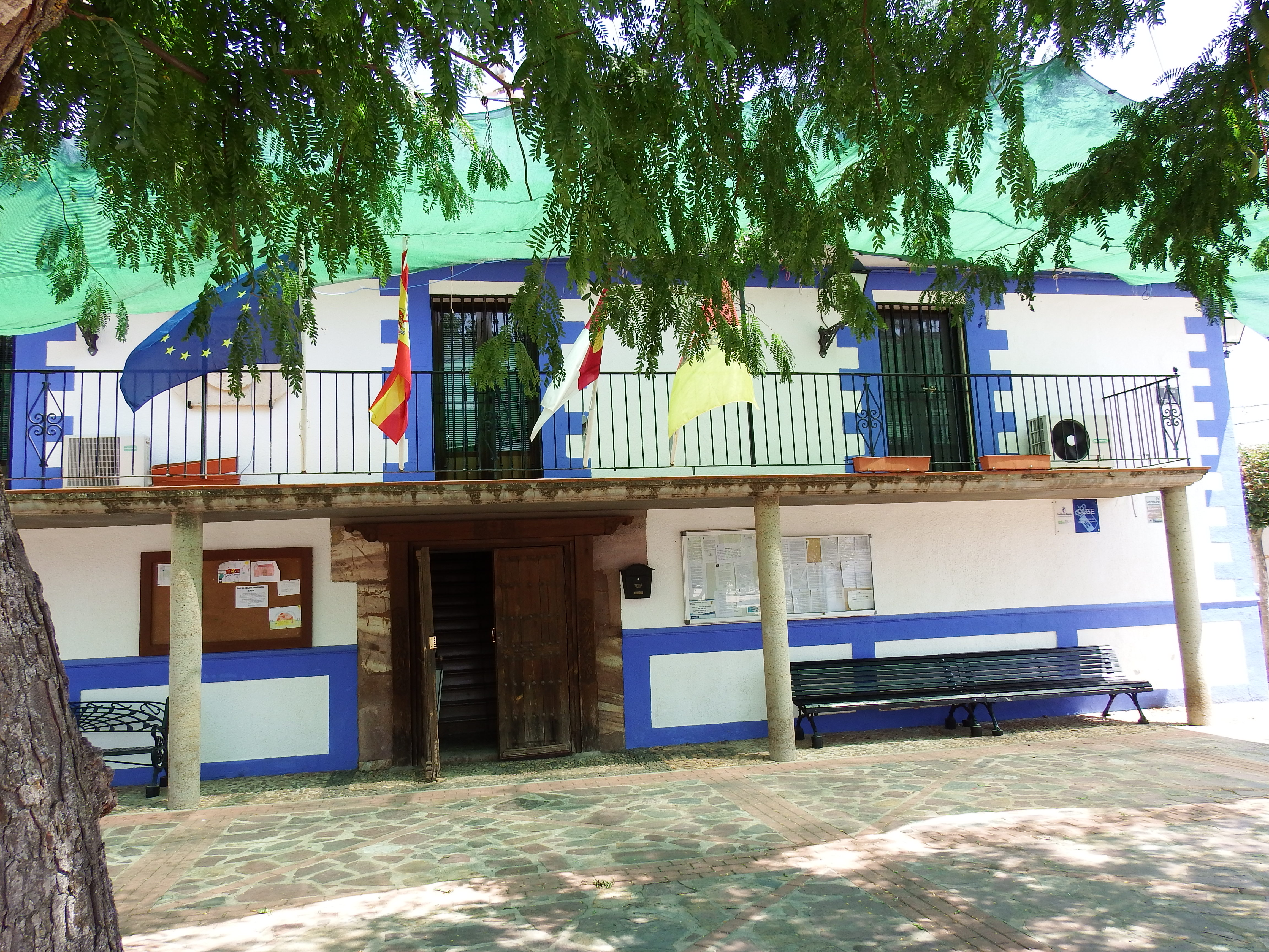 Picón, Ayuntamiento.